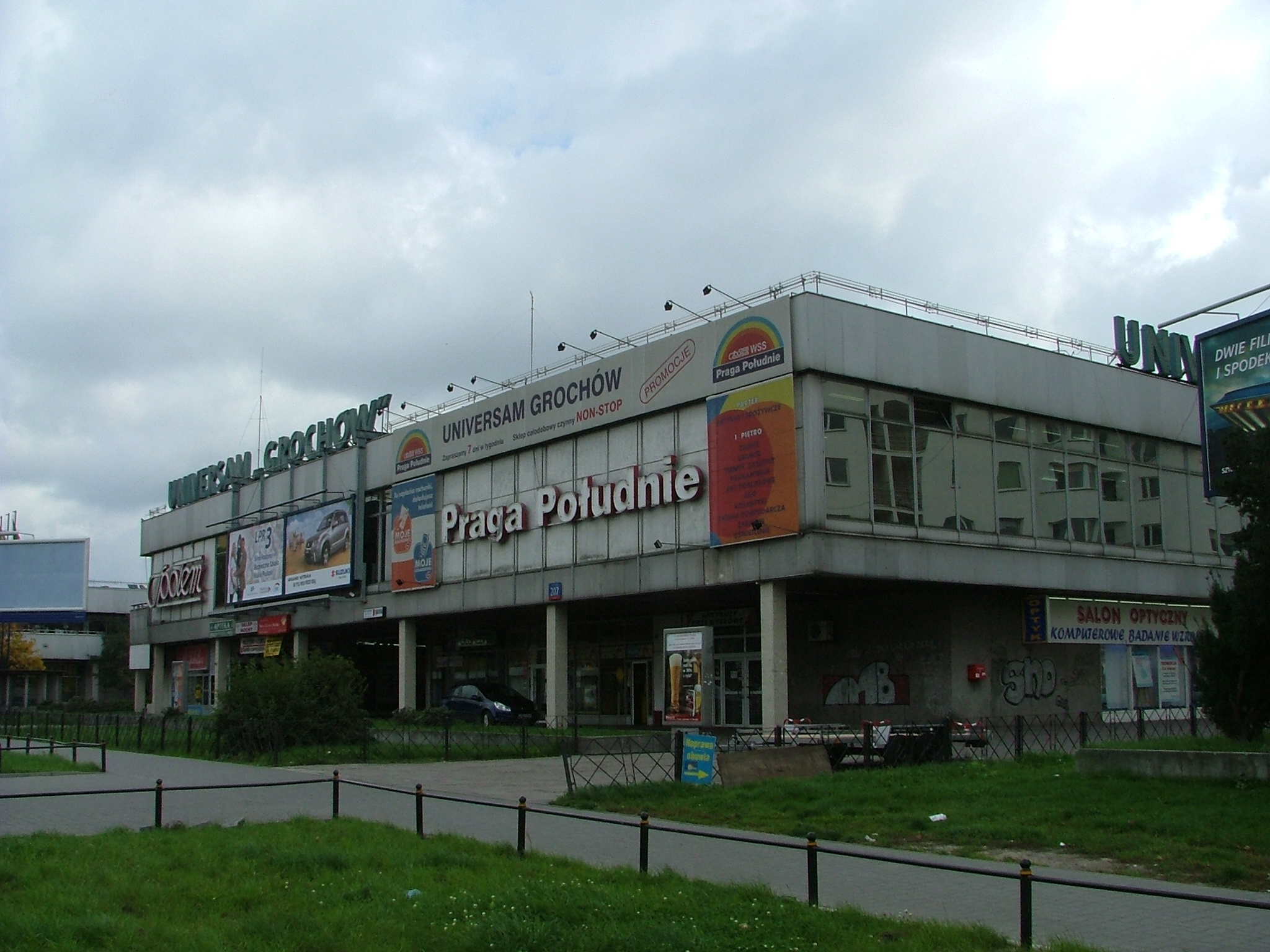 Warszawa - Praga Południe, Grochów, Universam Grochów